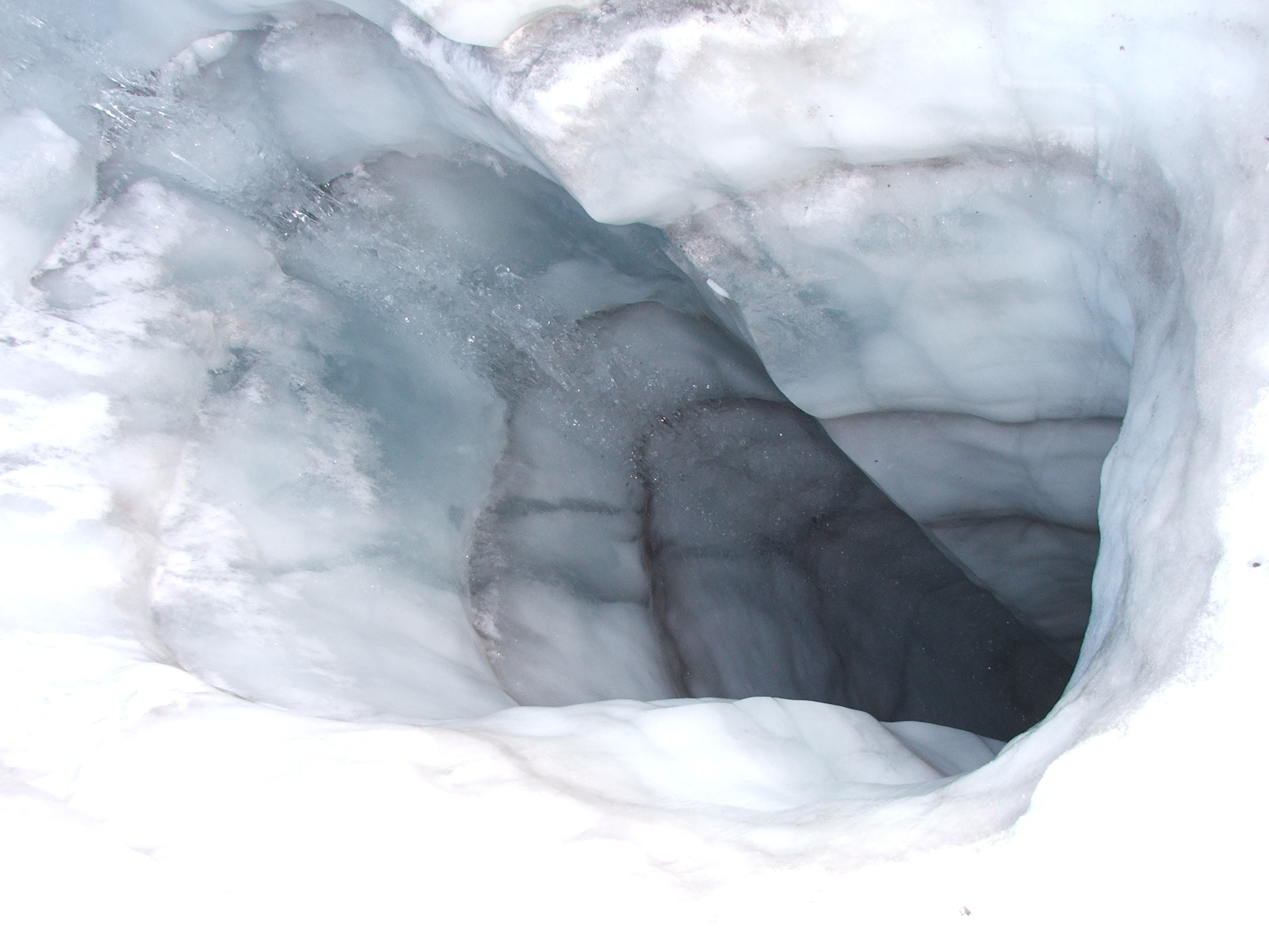 fatta da me